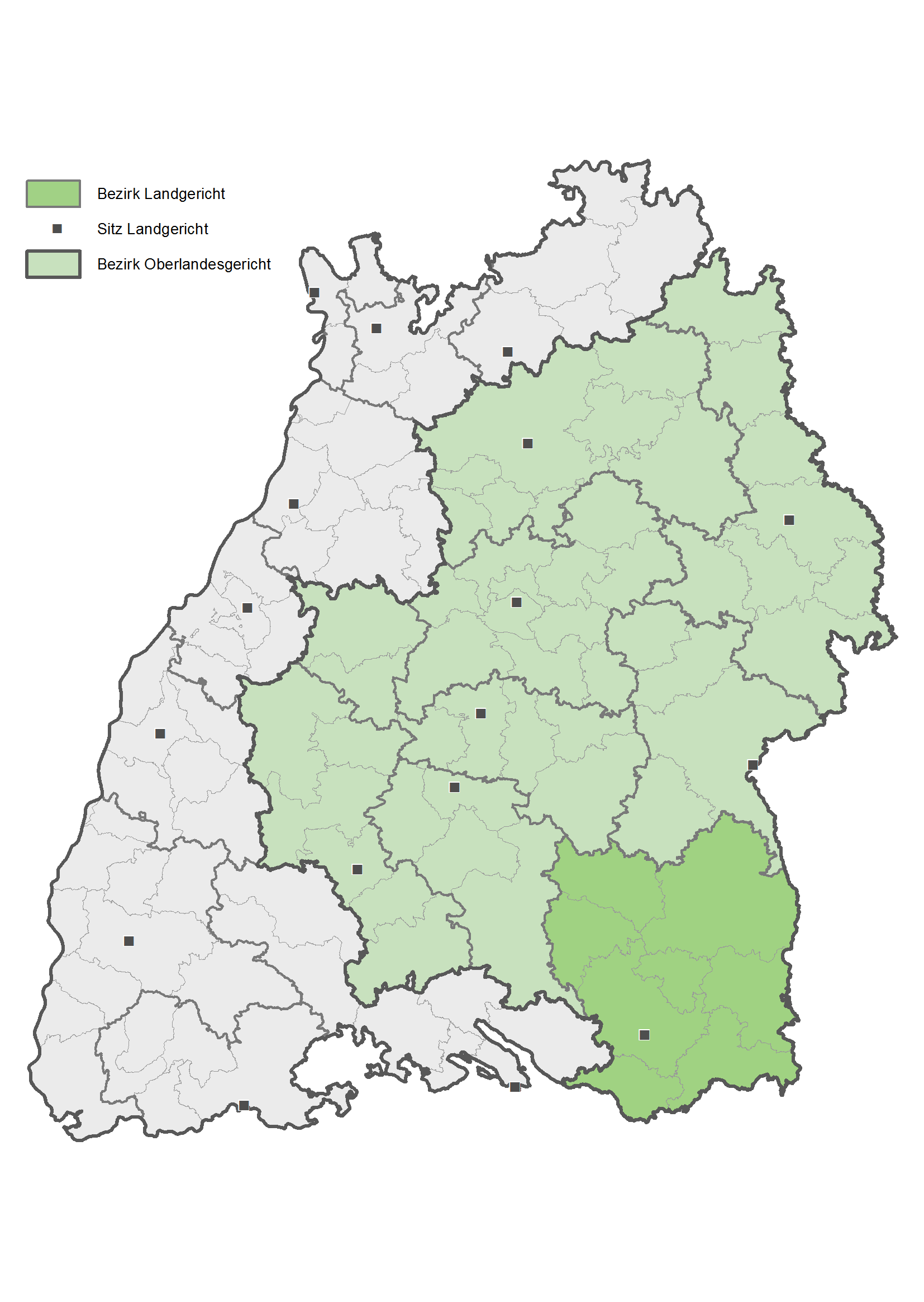 Karte des Bezirks des Landgerichts Ravensburg in Baden-Württemberg